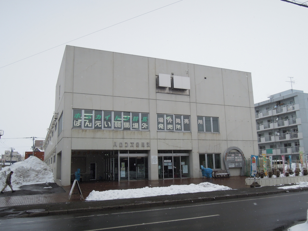 ハロンズ岩見沢外観